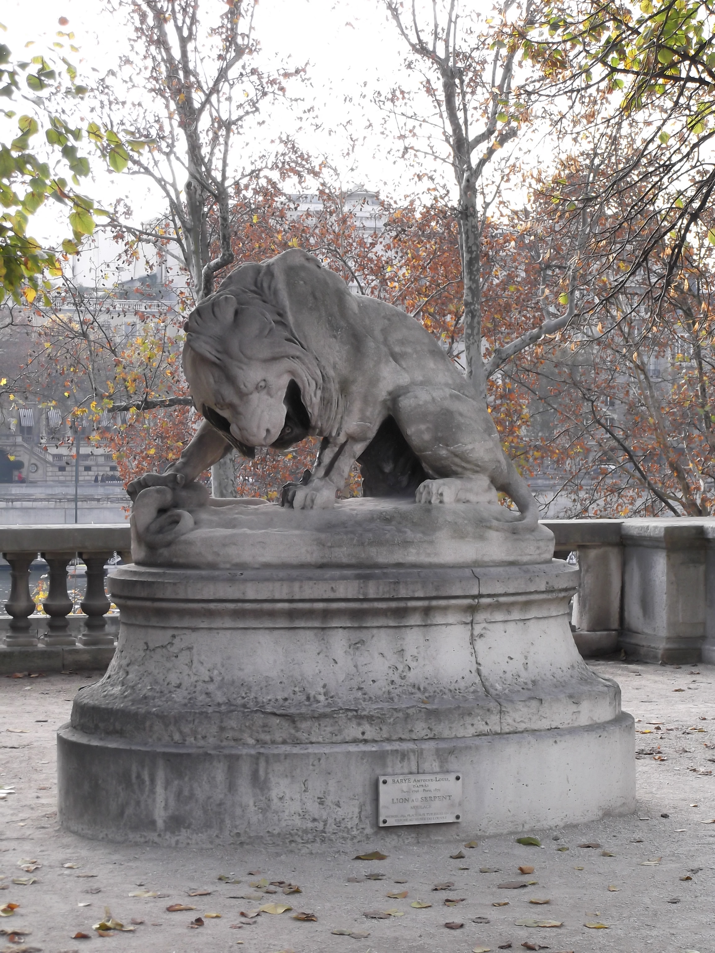 Lion au serpent by Antoine-Louis Barye, Jardin des Tuileries, Paris.